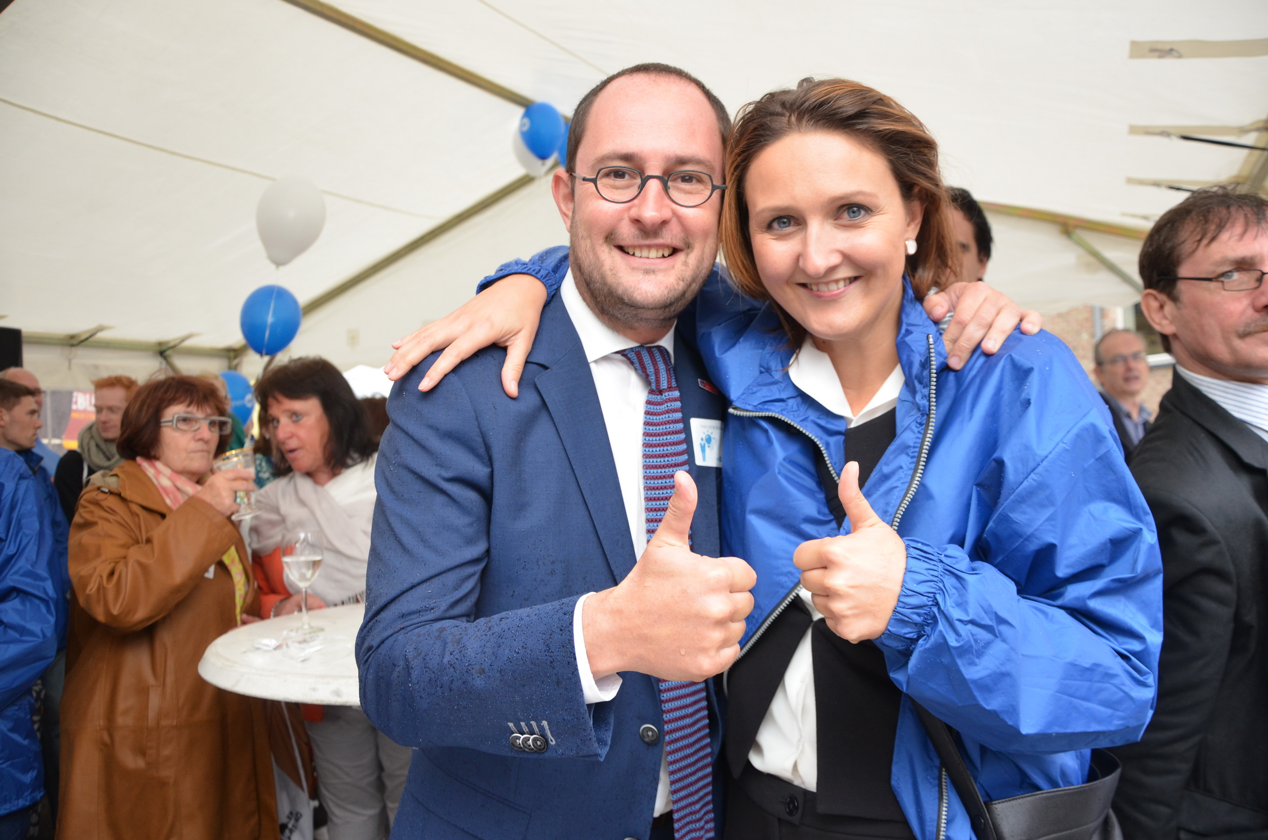 Vincent Van Quickenborne samen met partijvoorzitster Gwendolyn Rutten tijdens de Open VLD dag in Mechelen op 14 september 2013.